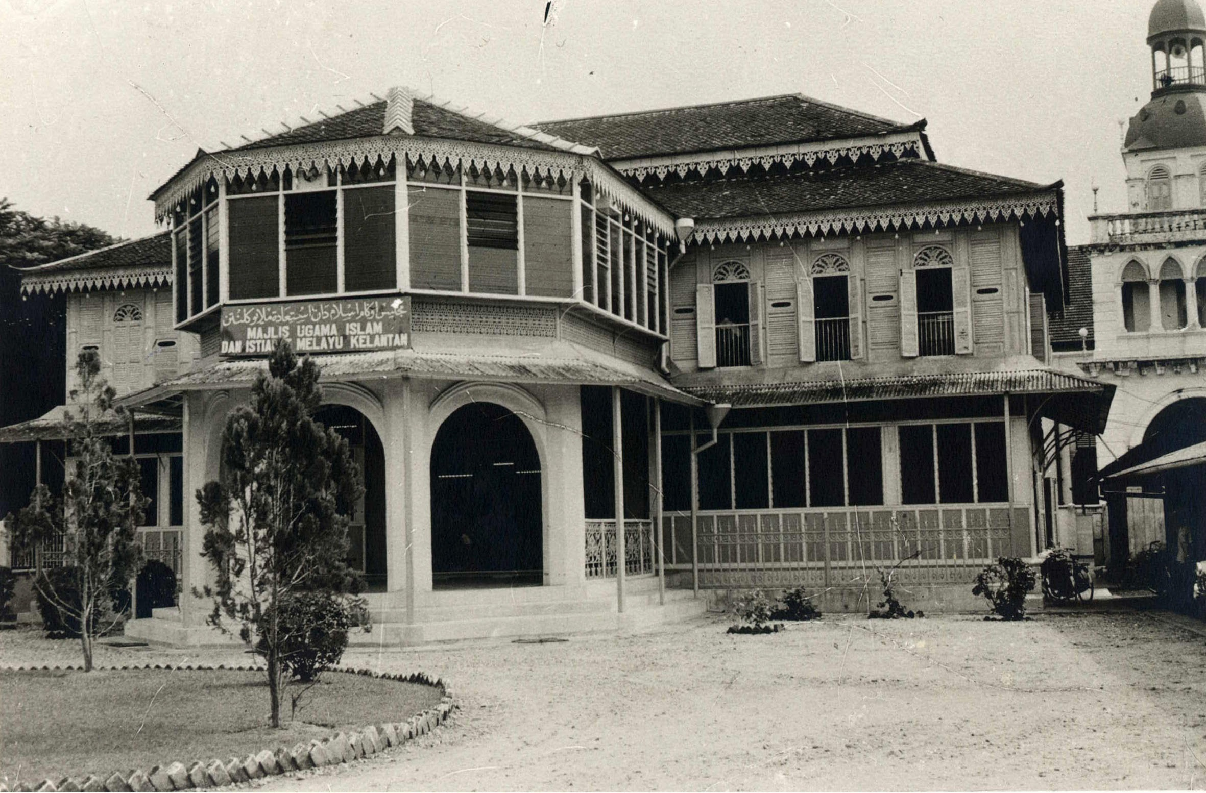 Bangunan Lama MAIK